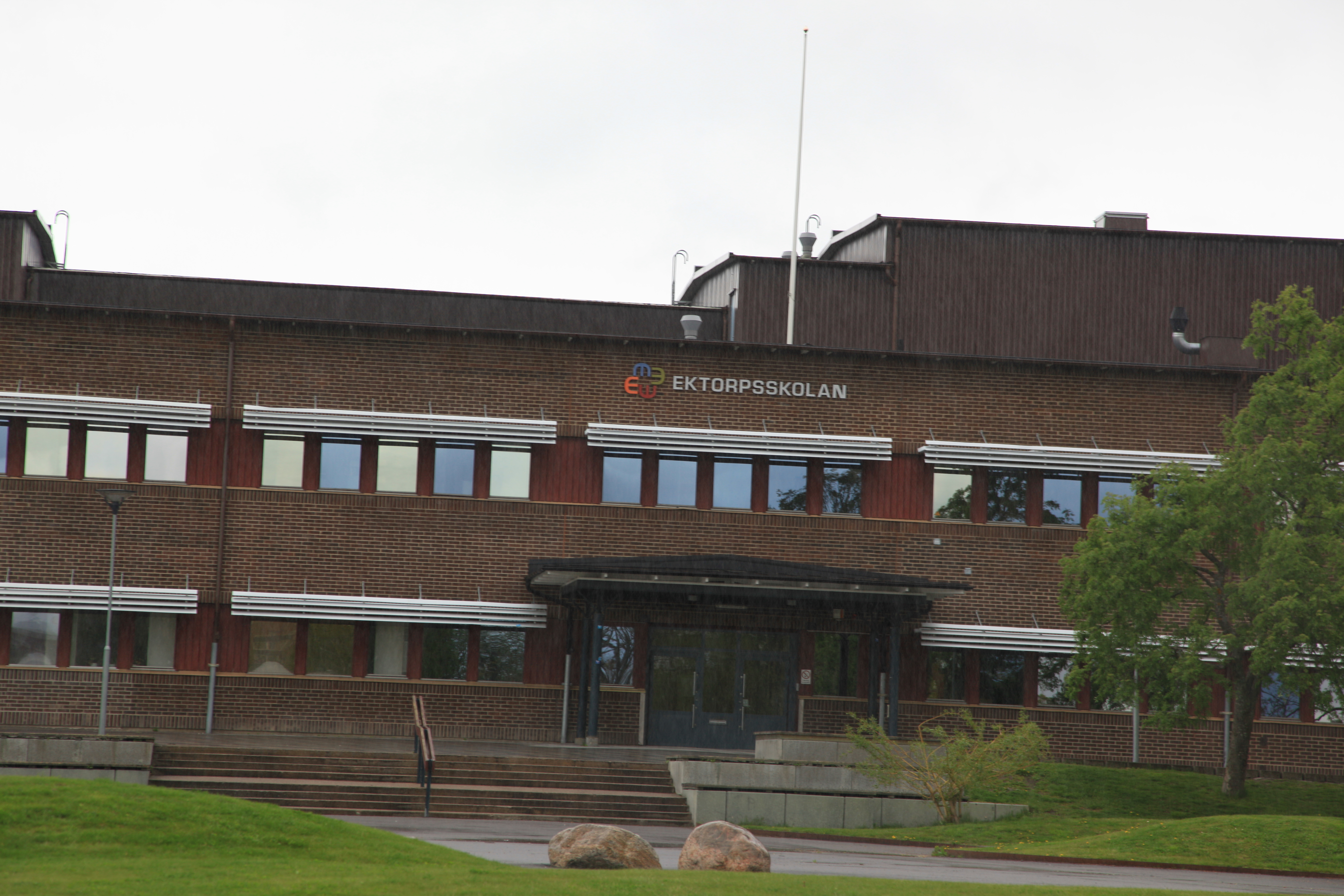 Ektorpsskolan in Norrköping